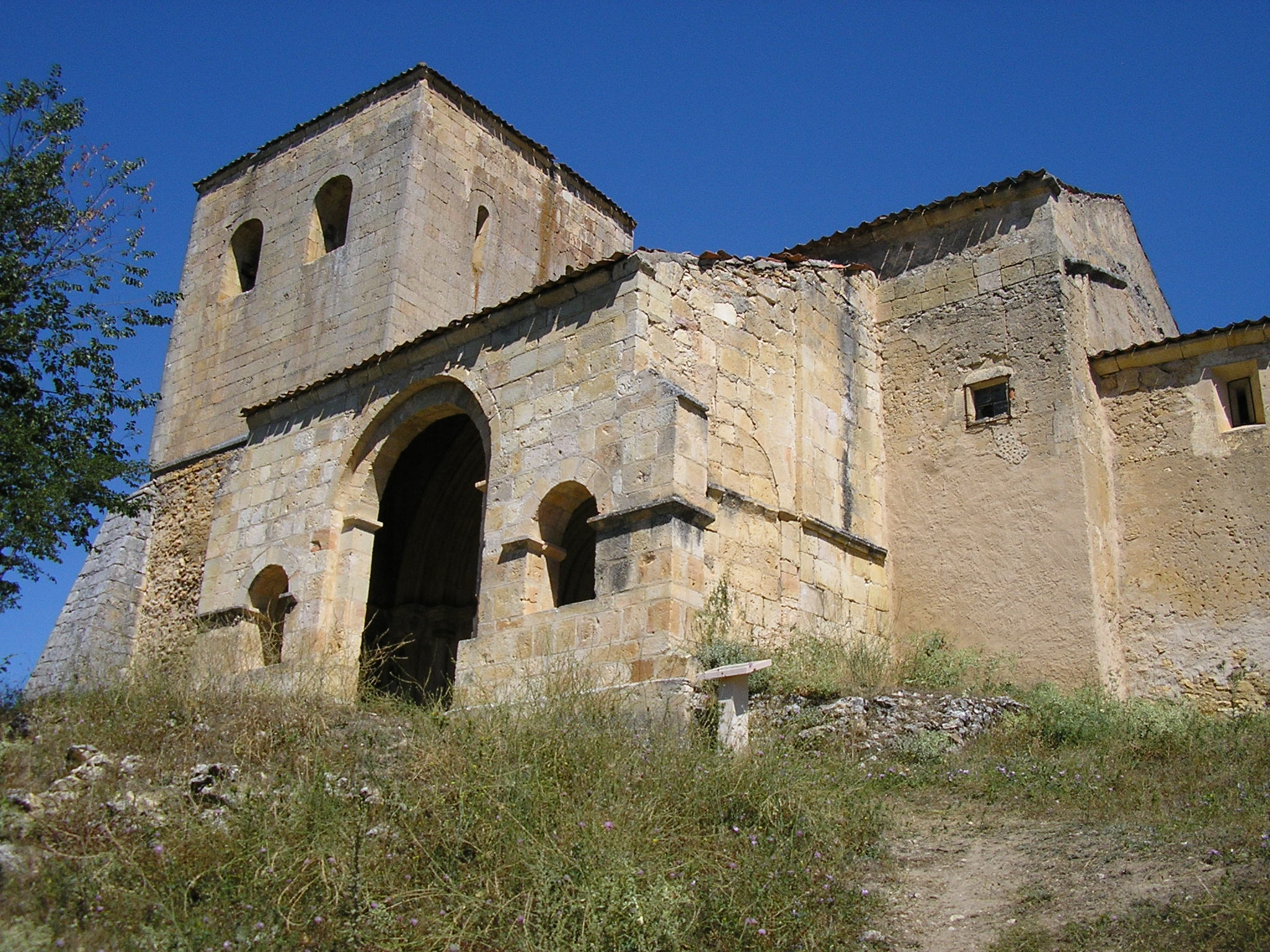 Navares de las Cuevas - Ermita de la Virgen del Barrio